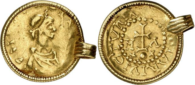 Solidus monté en bijou, frappé à Massalia, Marseille (Bouches-du-Rhône). Avers : CNLOTARIVS…buste diadémé et drapé à droite. Revers : …OTARI VICTVRIA…croix latine pattée, au-dessus d’un globe entre deux croisettes. Elle est accostée des lettres M et A. Clotaire II a fait frappé des monnaies marseillaises imitant le monnayage de Maurice Tibère. Il remplace la formule Victoria Augustorum par Victoria Chlotarii. On trouve des solidi frappés avec la mention du chiffre XXI et d’autres avec XX.